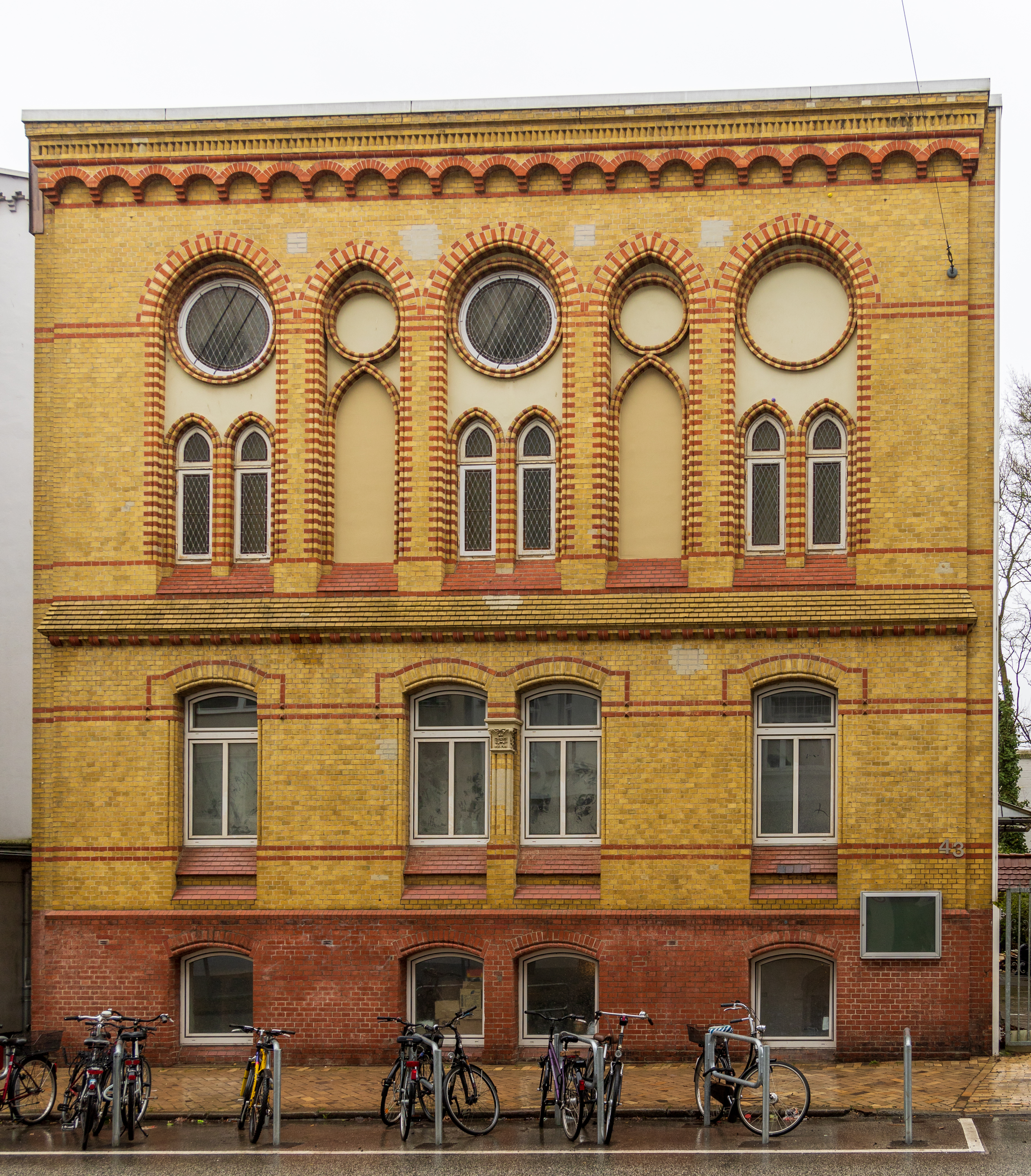 Die Synagoge der liberal ausgerichteten Jüdischen Gemeinde Kiel an der Waitzstraße